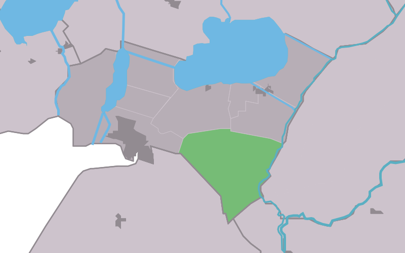 Kaartsje fan himrik fan Bantegea